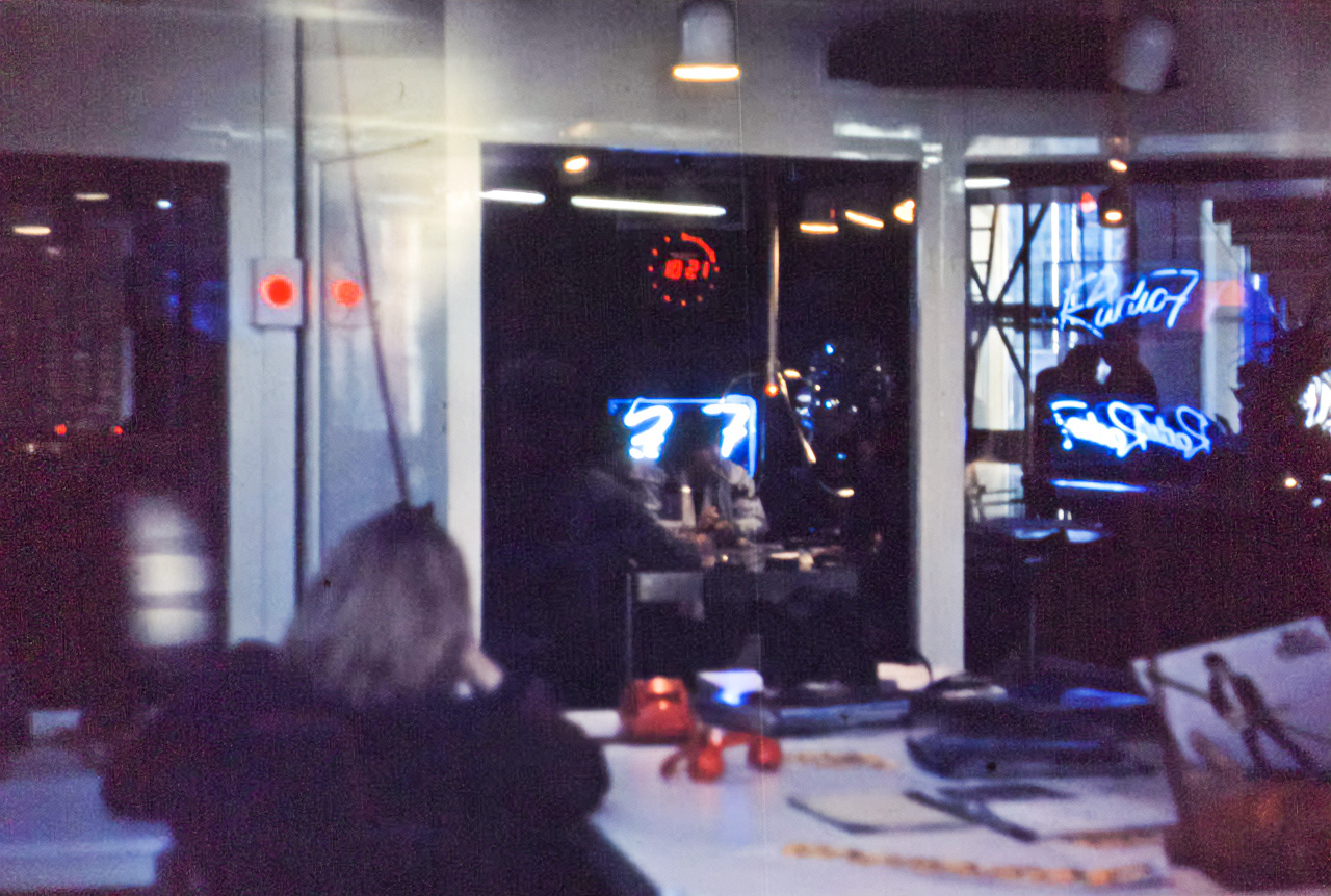 Radio 7, station de radio publique (Radio France) destinée aux jeunes en décembre 1980. Elle sera supprimée et remplacée par France Info en 1987.